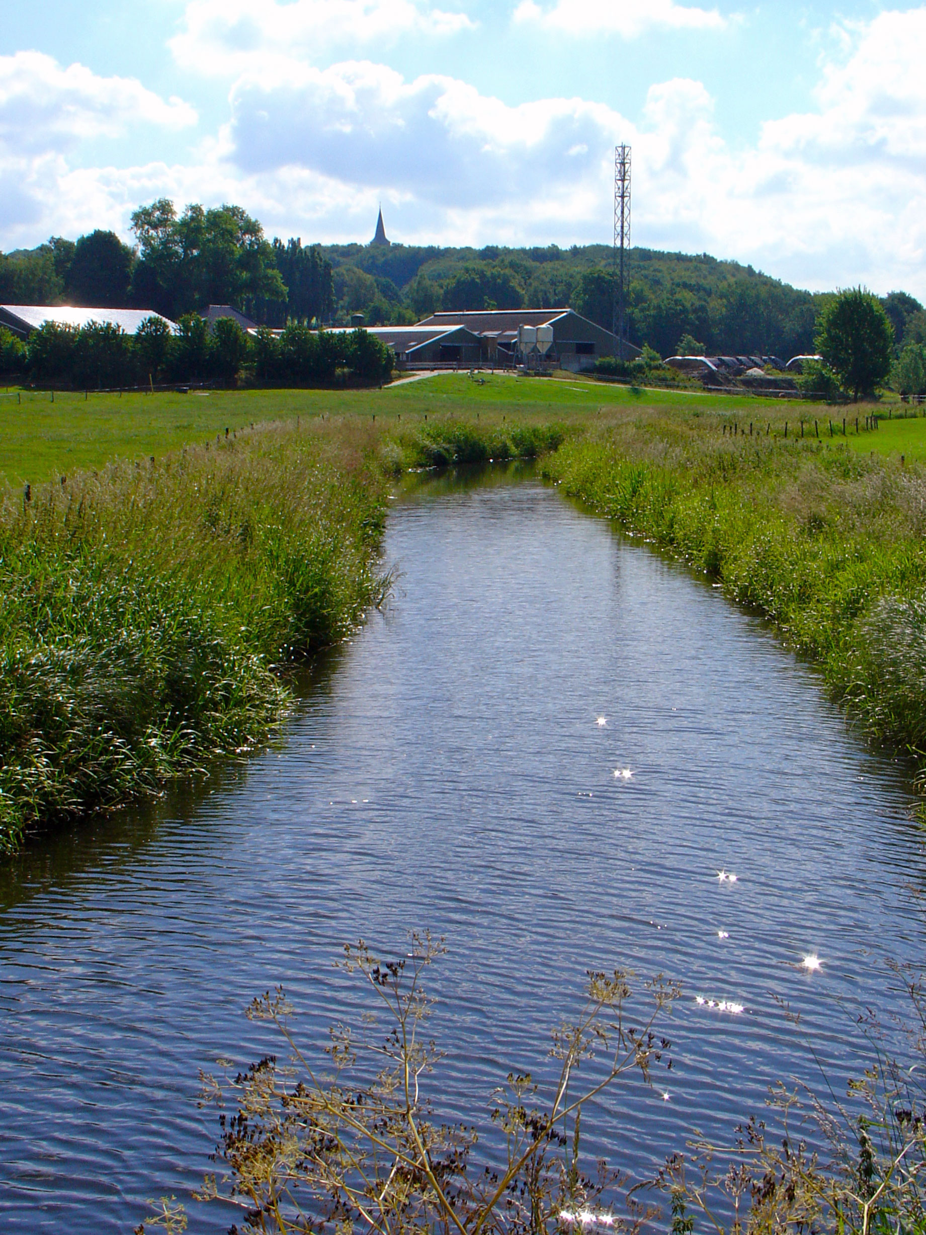 De Wild ten zuiden van Elten, op de achtergrond de Eltenberg met de Sint-Vituskerk